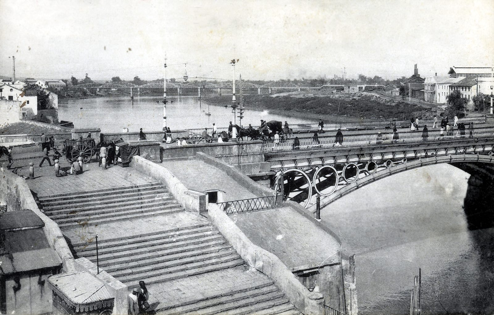 Vista de la plaza del Altozano y el comienzo del puente de Triana en 1914, antes de la construcción de la capilla del Carmen y del torreón del Faro. Al fondo se puede ver el antiguo puente denominado "de tablas".